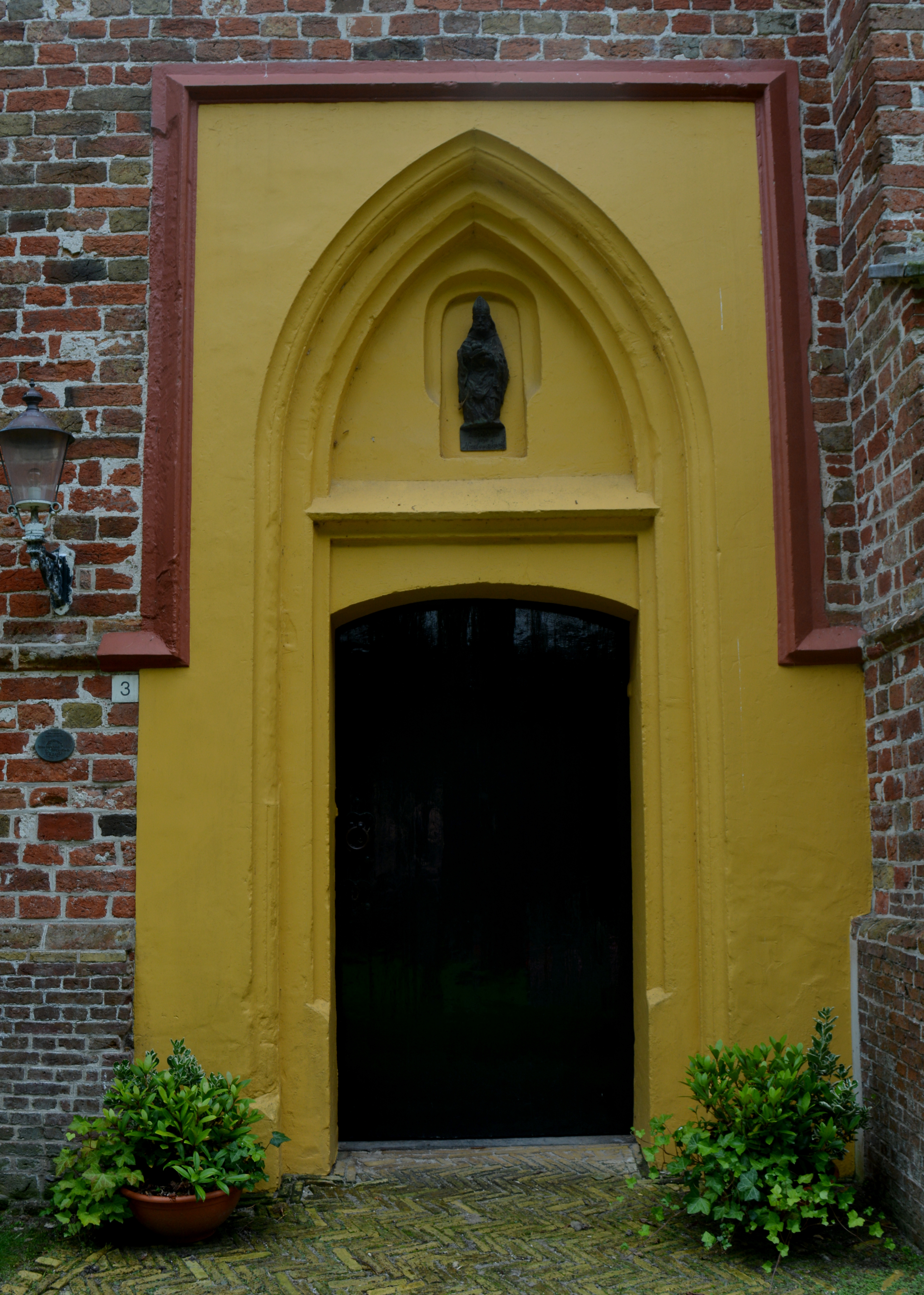 Blija, noordelijk portaal